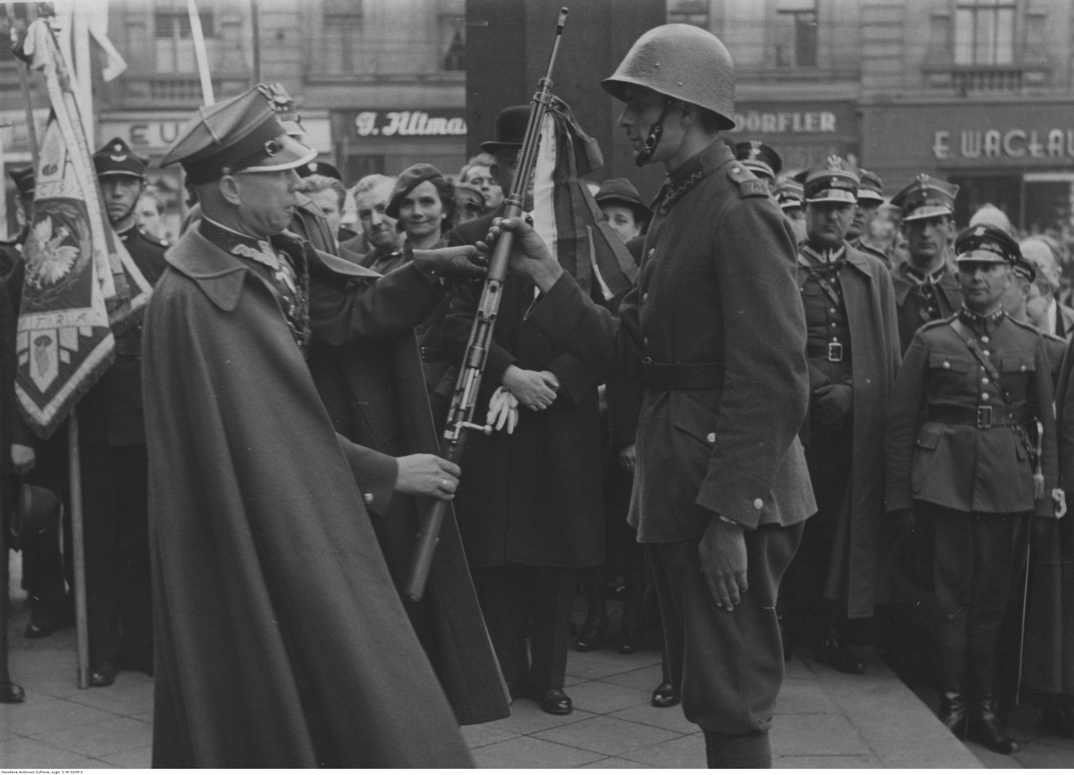 X-lecie Związku Strzeleckiego w Katowicach. Podpułkownik WP Piotr Sosialuk wręcza żołnierzowi 73 Pułku Piechoty karabin Mauser 7,92 mm wz. 98, udekorowany wstążkami w barwach narodowych. Koncern Ilustrowany Kurier Codzienny - Archiwum Ilustracji. Sygnatura: 1-W-2239-1